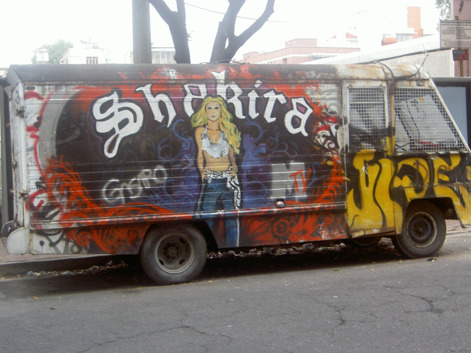 Furgo con el diseño de la cantante Shakira.